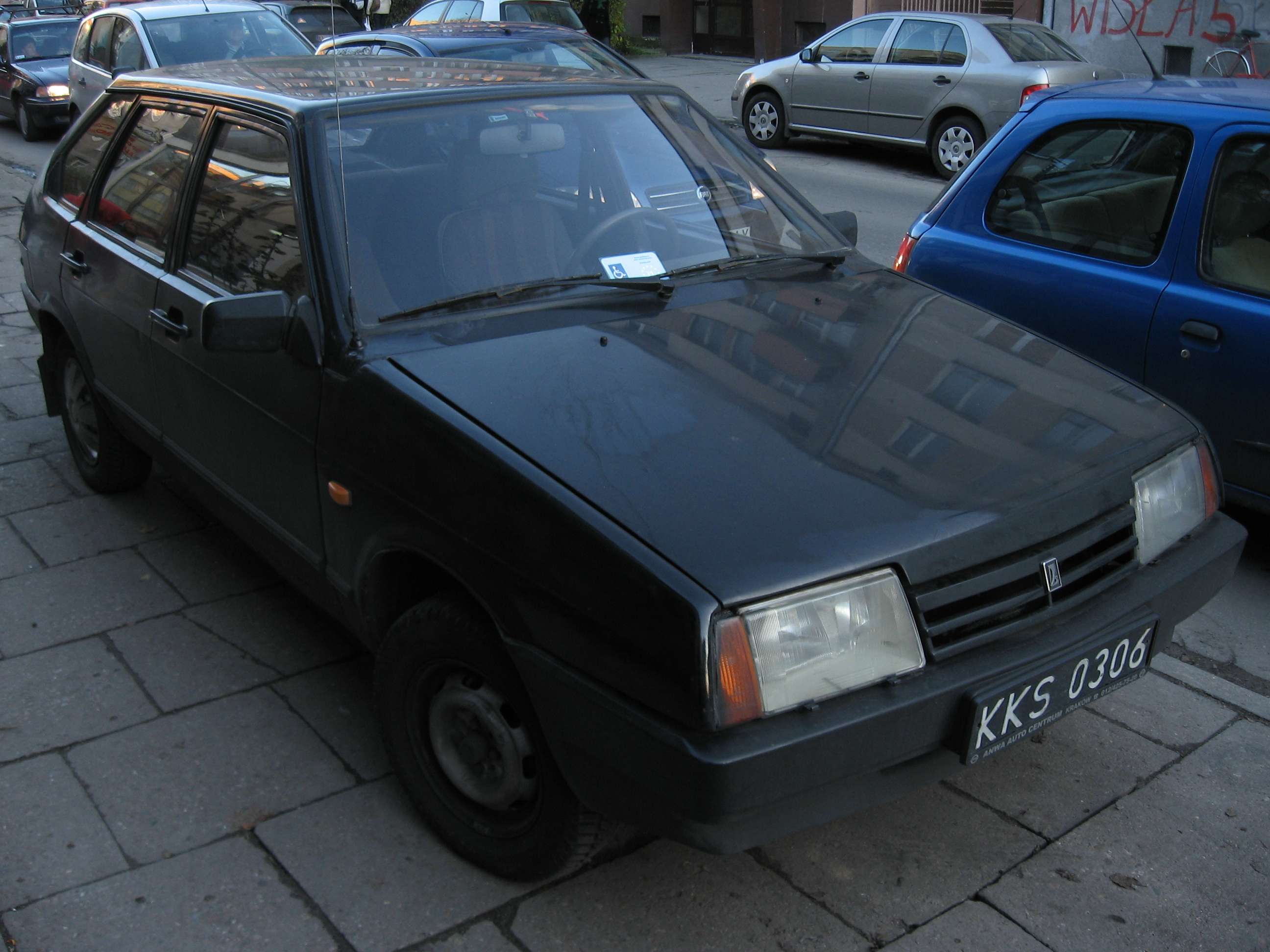 Lada Samara 2109 in Kraków.